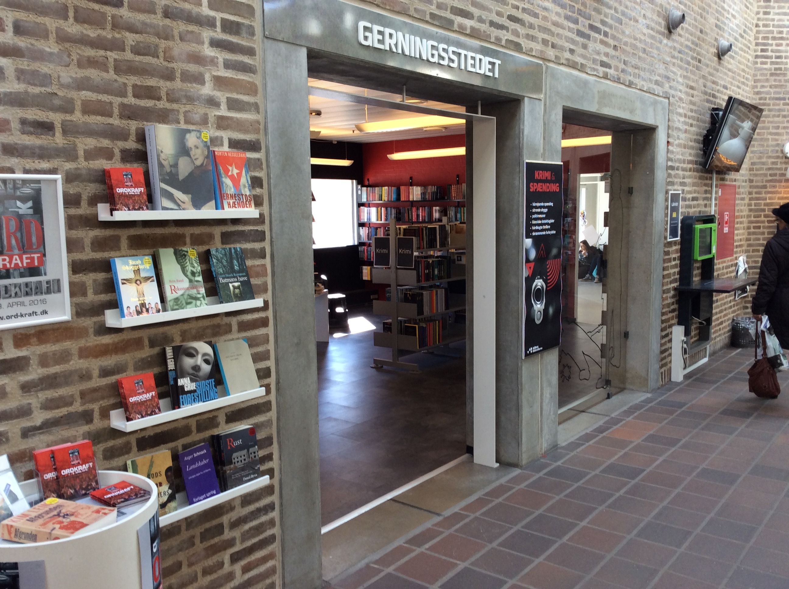 Aalborg Biblioteks temaer/udstillinger.